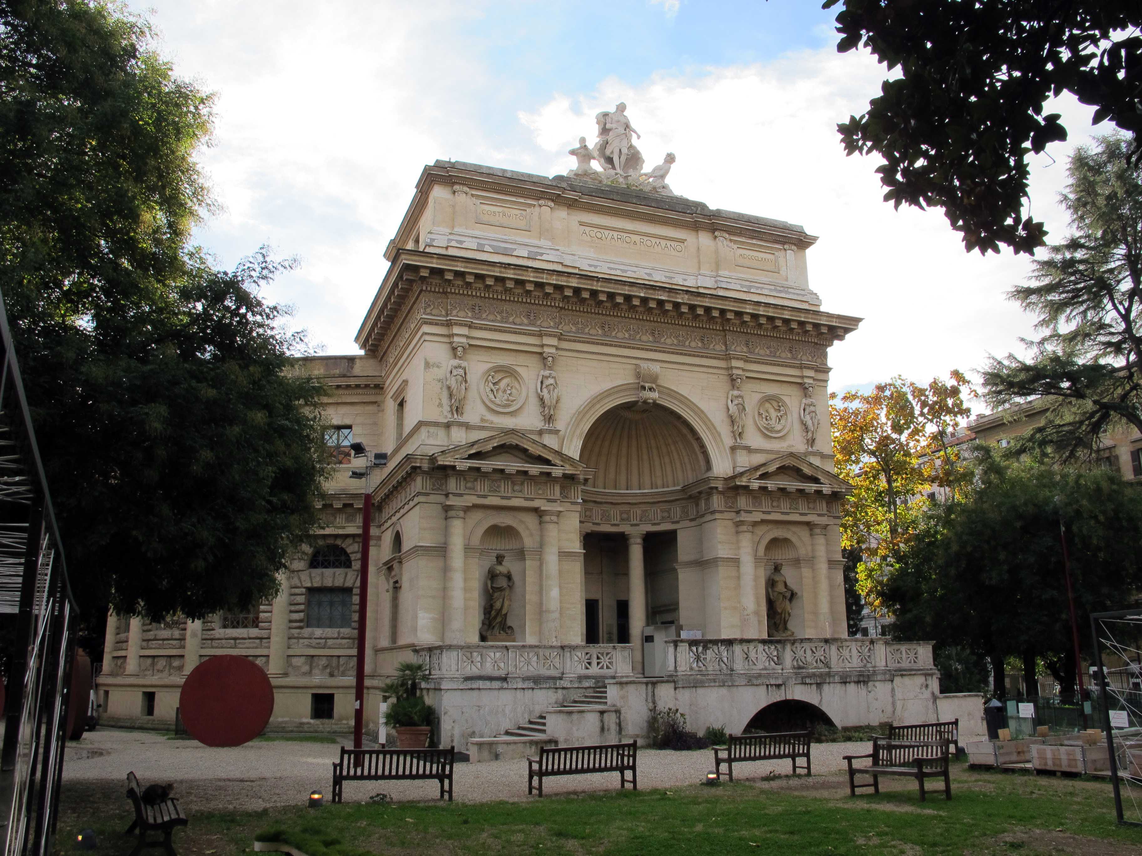 Roma, vedi titolo